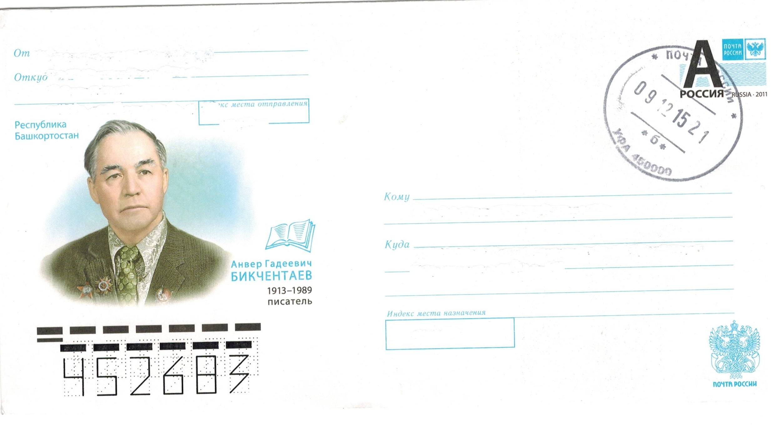 Первый художественный маркированный конверт России, 2011. Посвящён башкирскрму писателю Бикчентаеву Анверу Гадеевичу